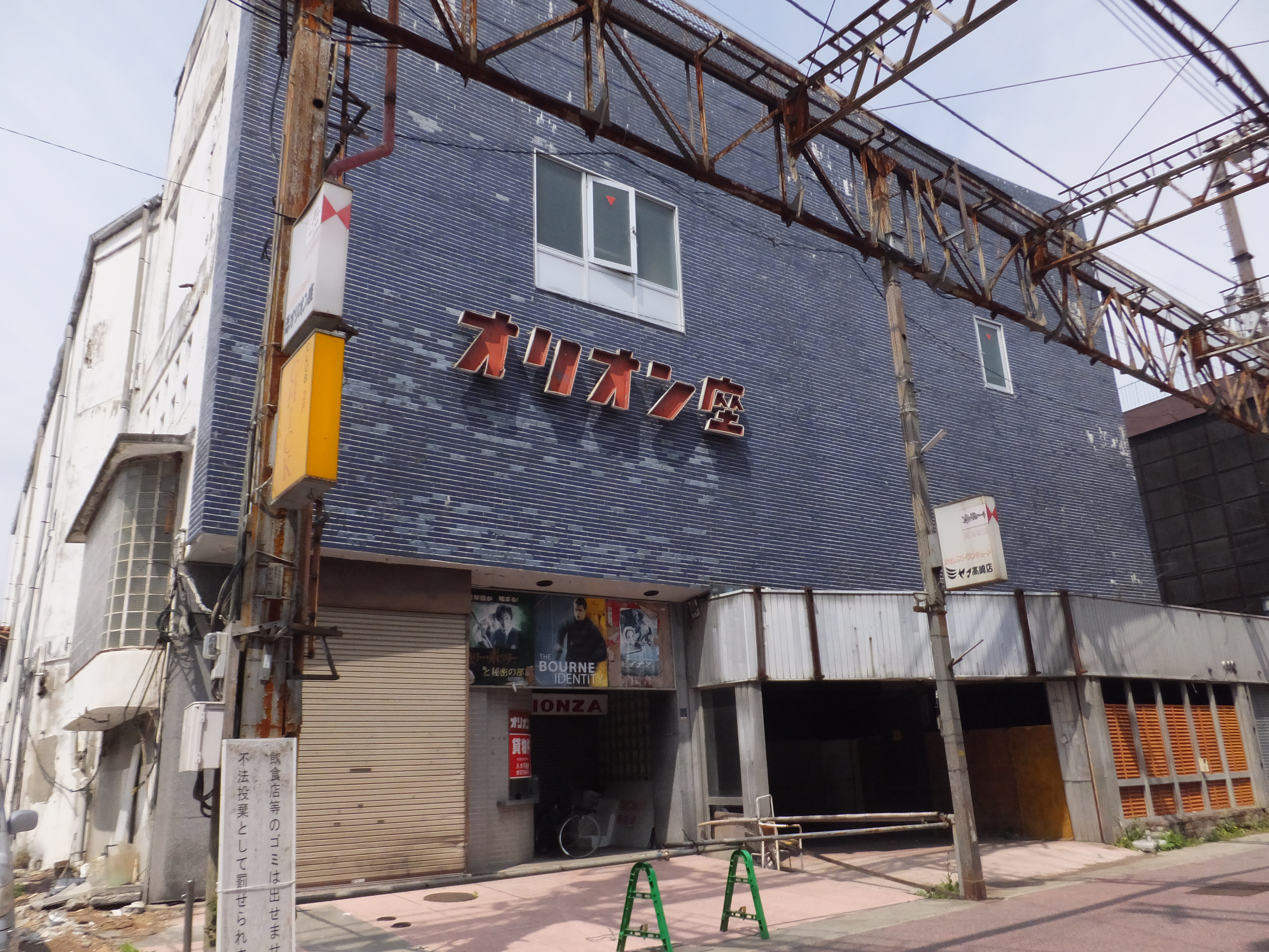 2003年に廃館した高崎アーケードにある高崎オリオン座の外観